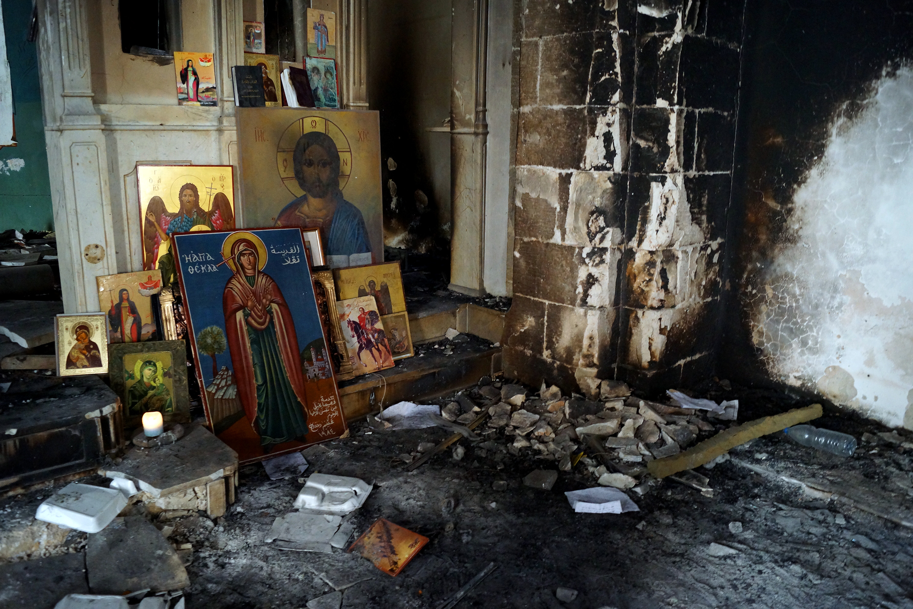 Христианские храмы в Маалюле (Сирия), сожжённые и разграбленные боевиками